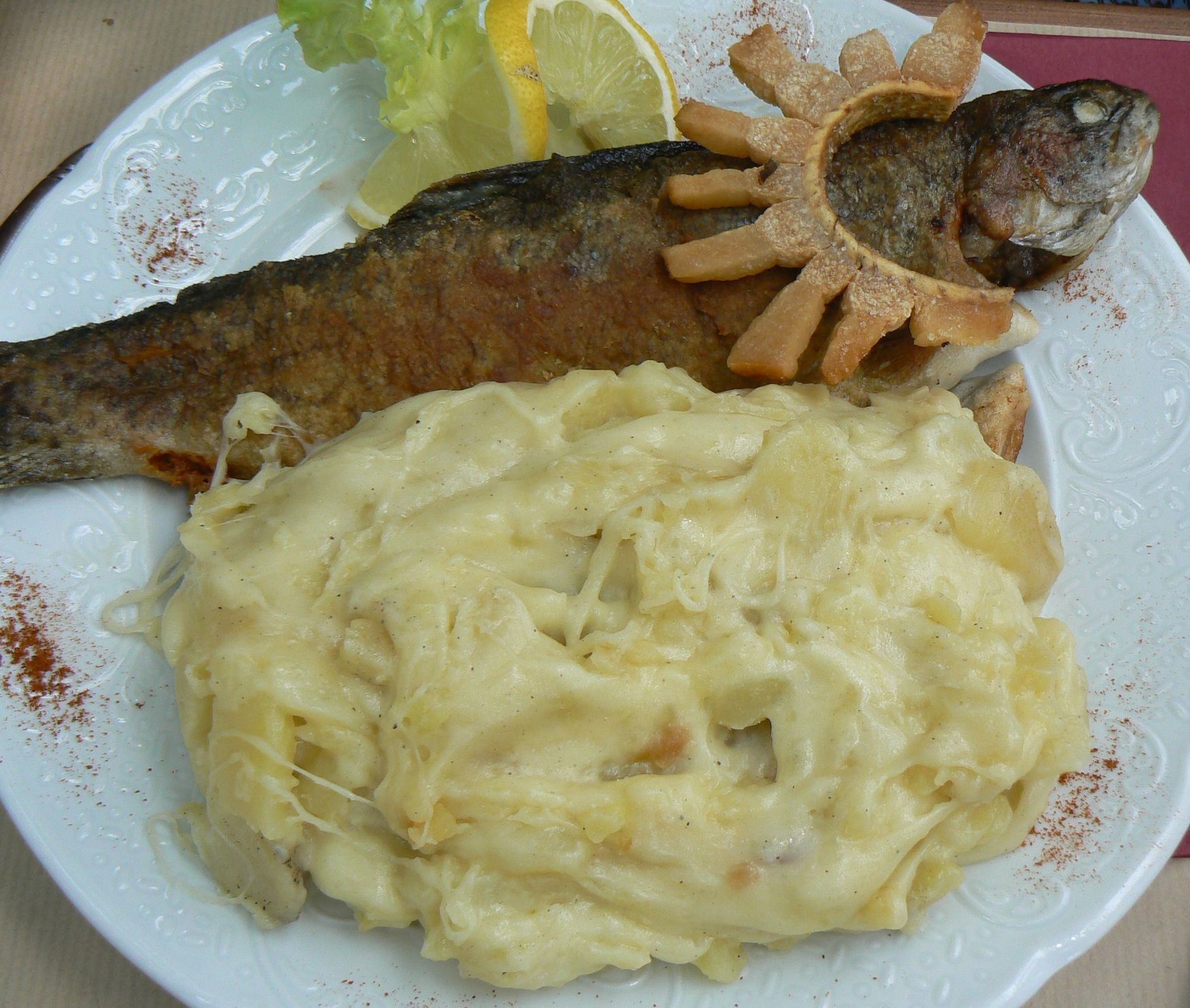 Truita de riu cuinada al llard de porc "cul negre", com és típic a les zones no costaneres d'Occitània. Està acompanyada de trufada i decorada amb el que en occità es coneix com a "brejú", una llesca de cansalada, freixida. El centre d'Occitània és molt ric en rius i llacs, i las pesca, especialment de la truita, ha estat sempre molt tradicional. A la cuina catalana abans també era tan habitual cuinar amb llard de porc com en oli d'oliva. Tant a occitània com als Països Catalans, però, els pescadors de la costa mediterrània utilitzen sempre, tradicionalment, oli d'oliva i no greixos animals (com ara llard, mantega, nata, formatge, etc.) per a cuinar el peix d'aigua salada.